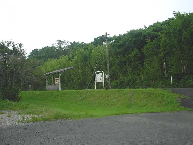 開聞駅（2005年7月投稿者が撮影）